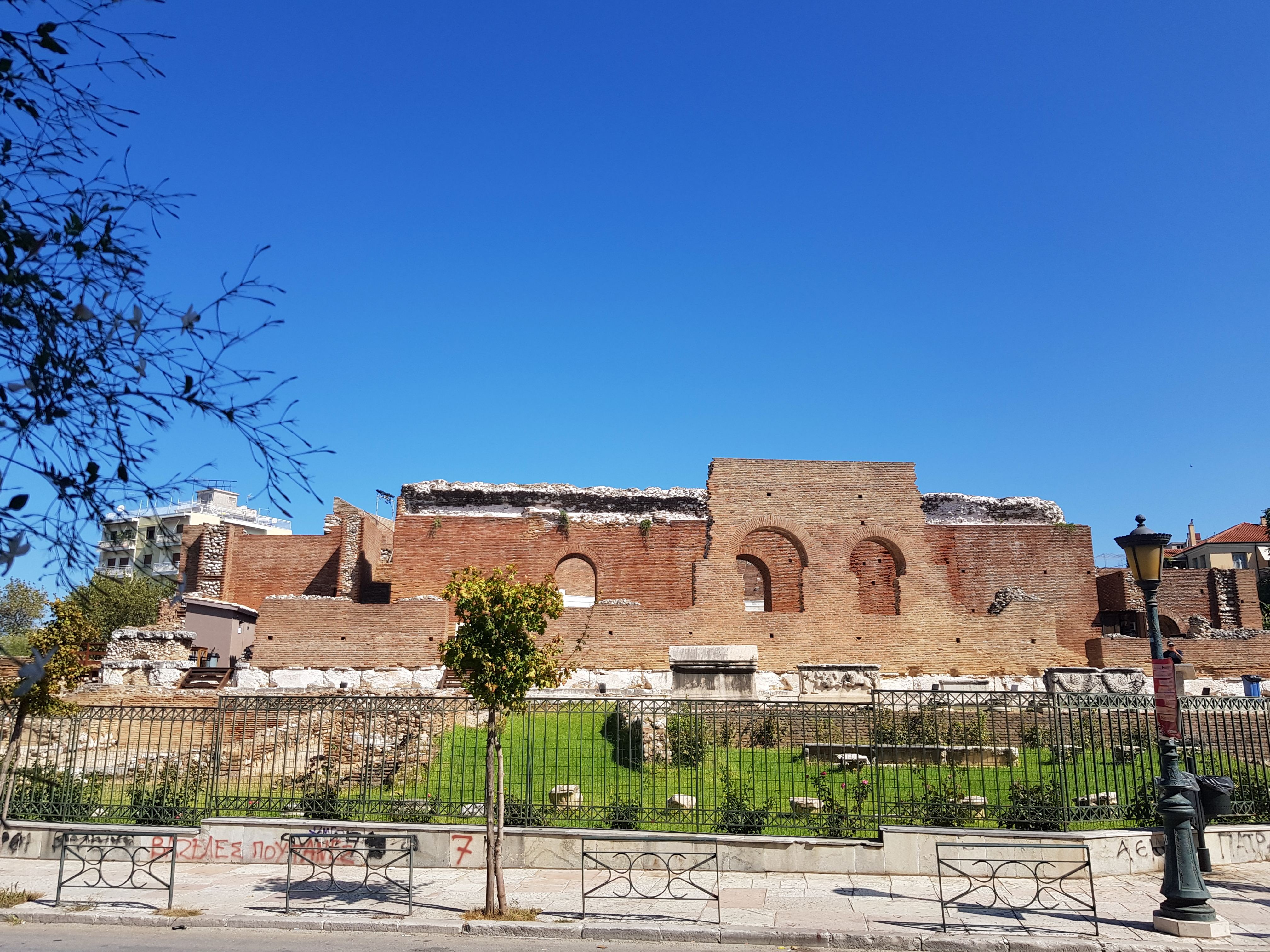 Ρωμαϊκό Ωδείο Πατρών«Ρωμαϊκό Ωδείο Πατρών»